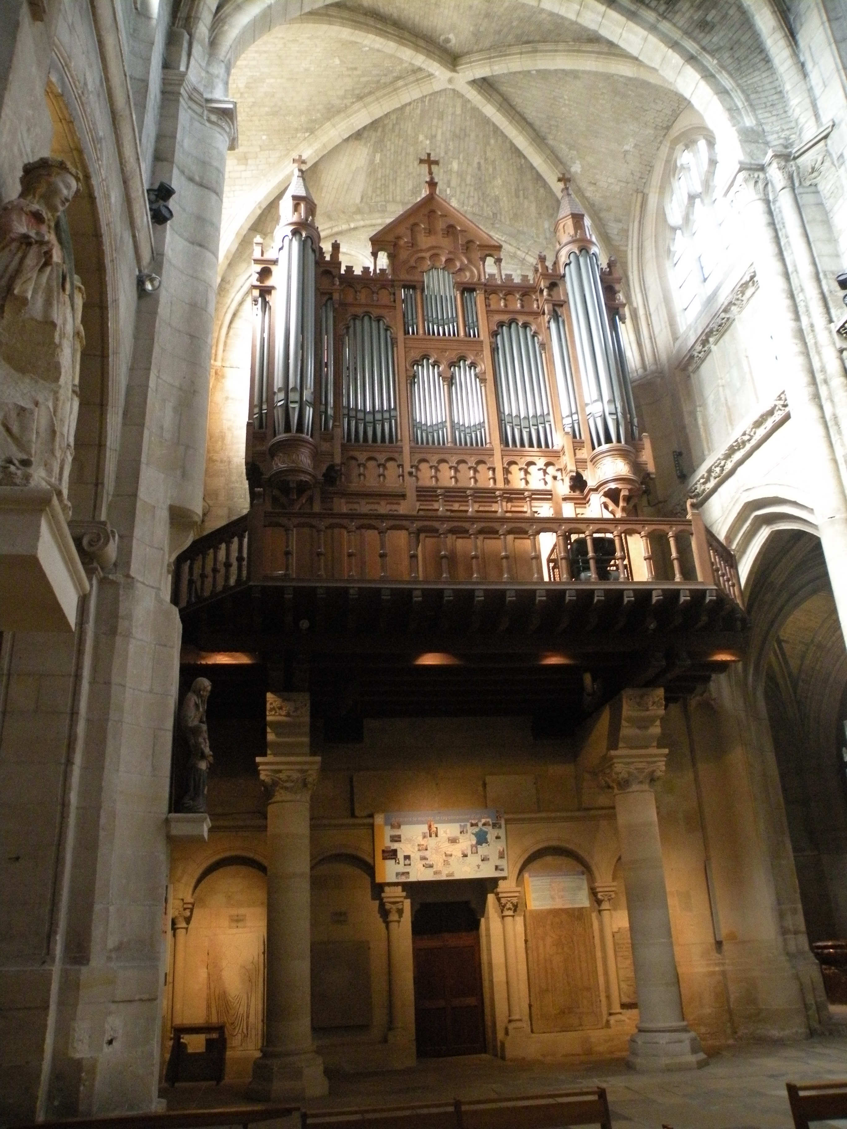 Interior of Collégiale Notre-Dame de Poissy orgue